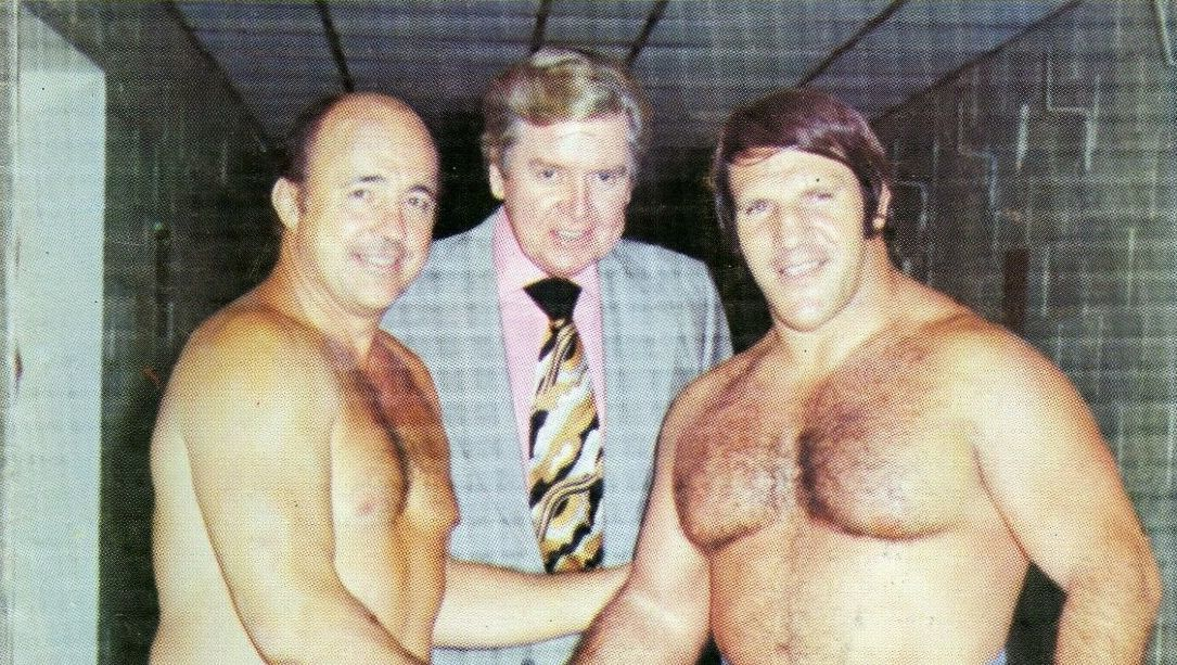 Vincent James McMahon, Verne Gagne and Bruno Sammartino en couverture du magazine de catch Wrestling News d'août-septembre 1975